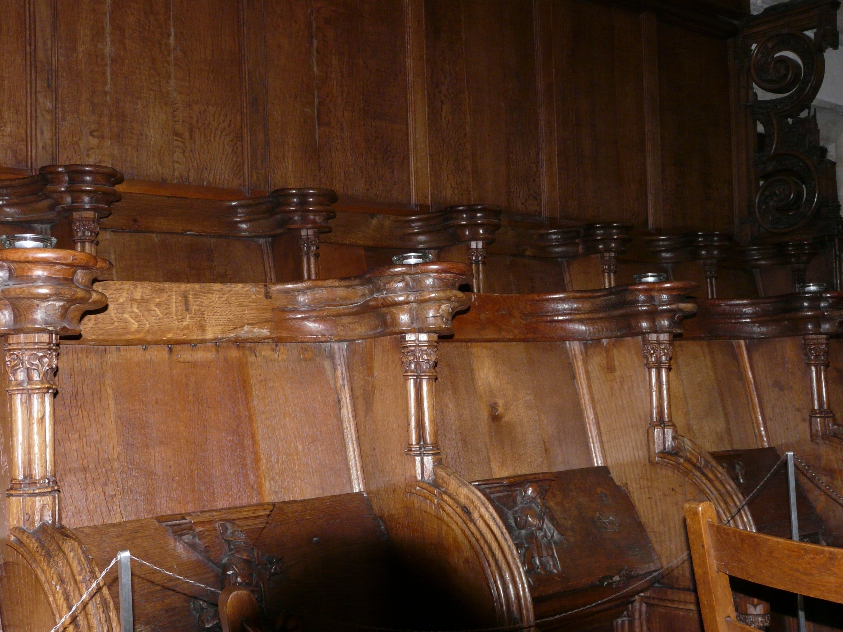 Detail koorbanken van de Grote Kerk Breda in Breda Centrum